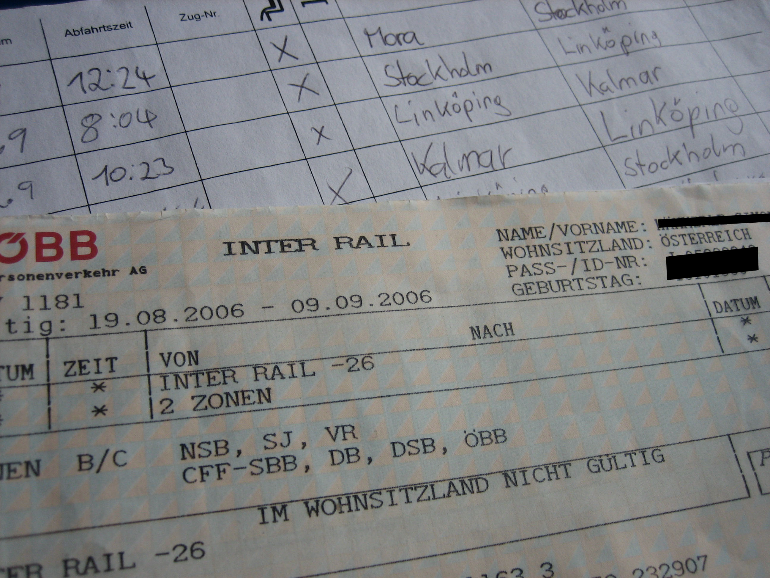 Interrail Karte mit Fahrtenbuch aus dem Jahr 2006